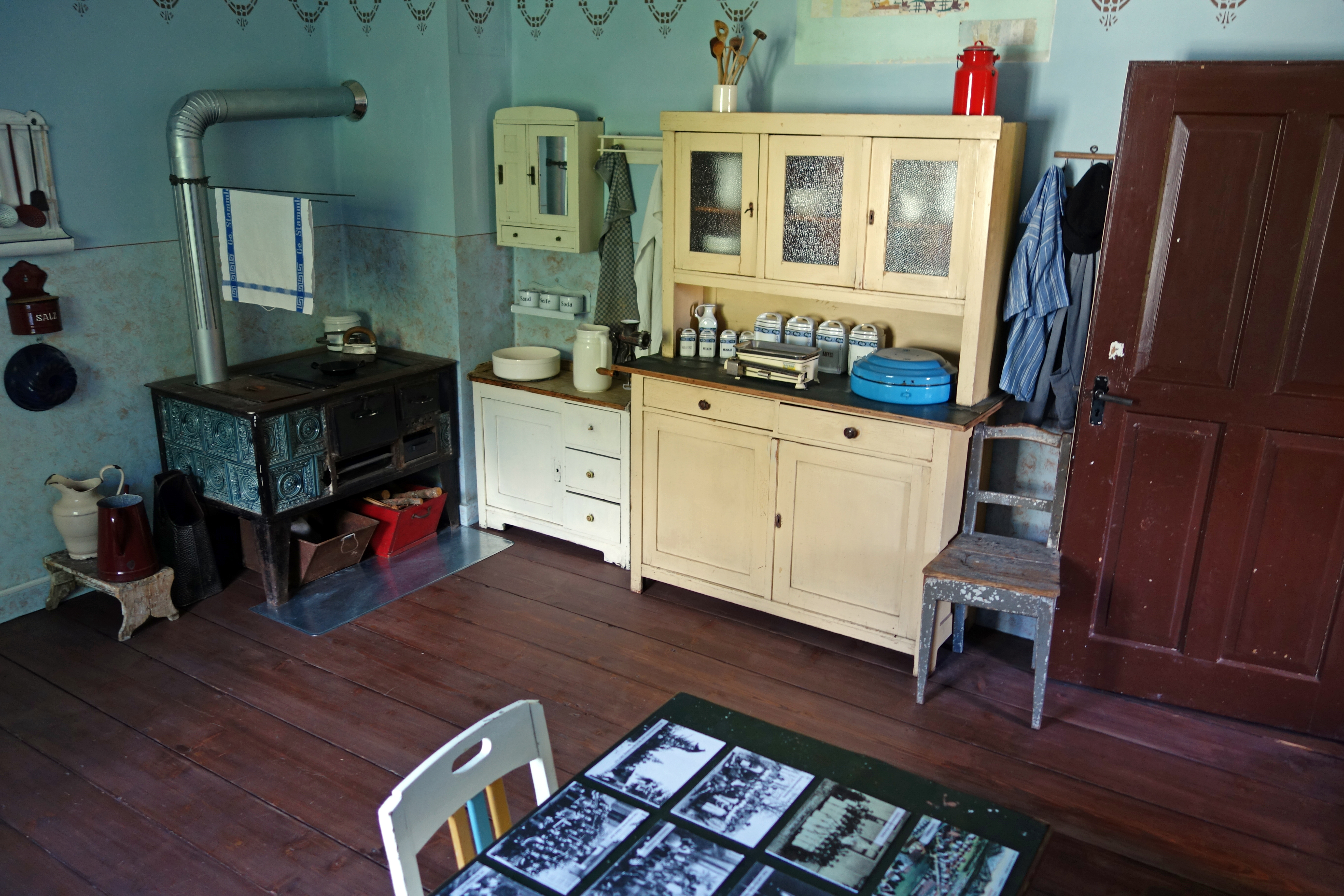 Originalgetreue historische Bergarbeiterwohnung im Museum Penzberg (um 1920)